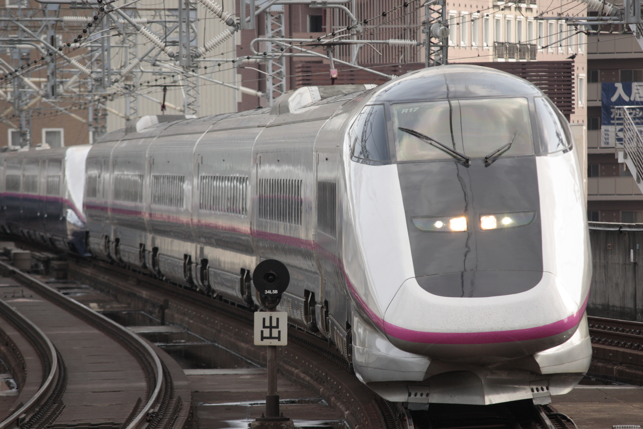 こまち向けのE3系（仙台駅にて）